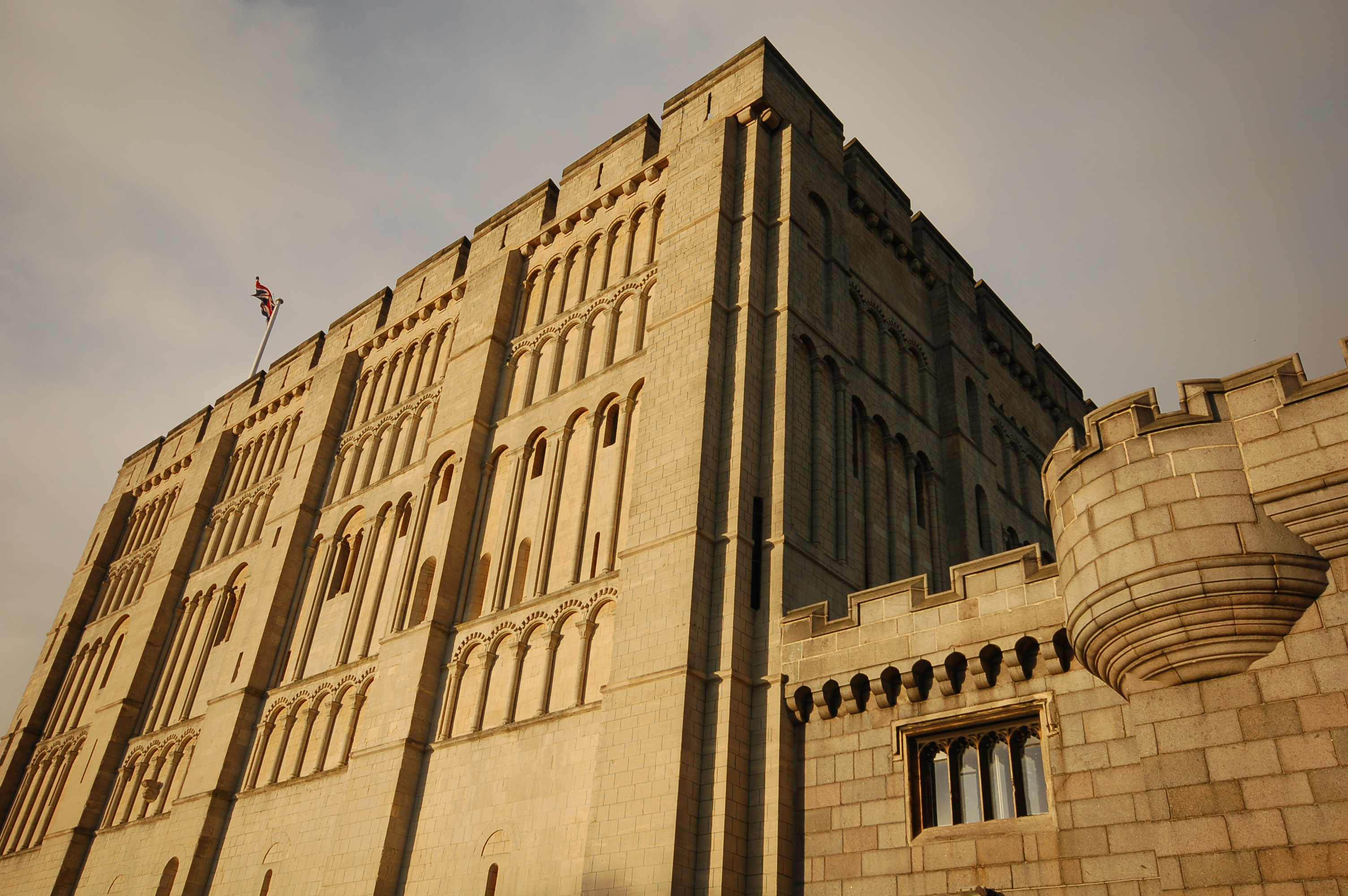 Chateau de Norwich, GB